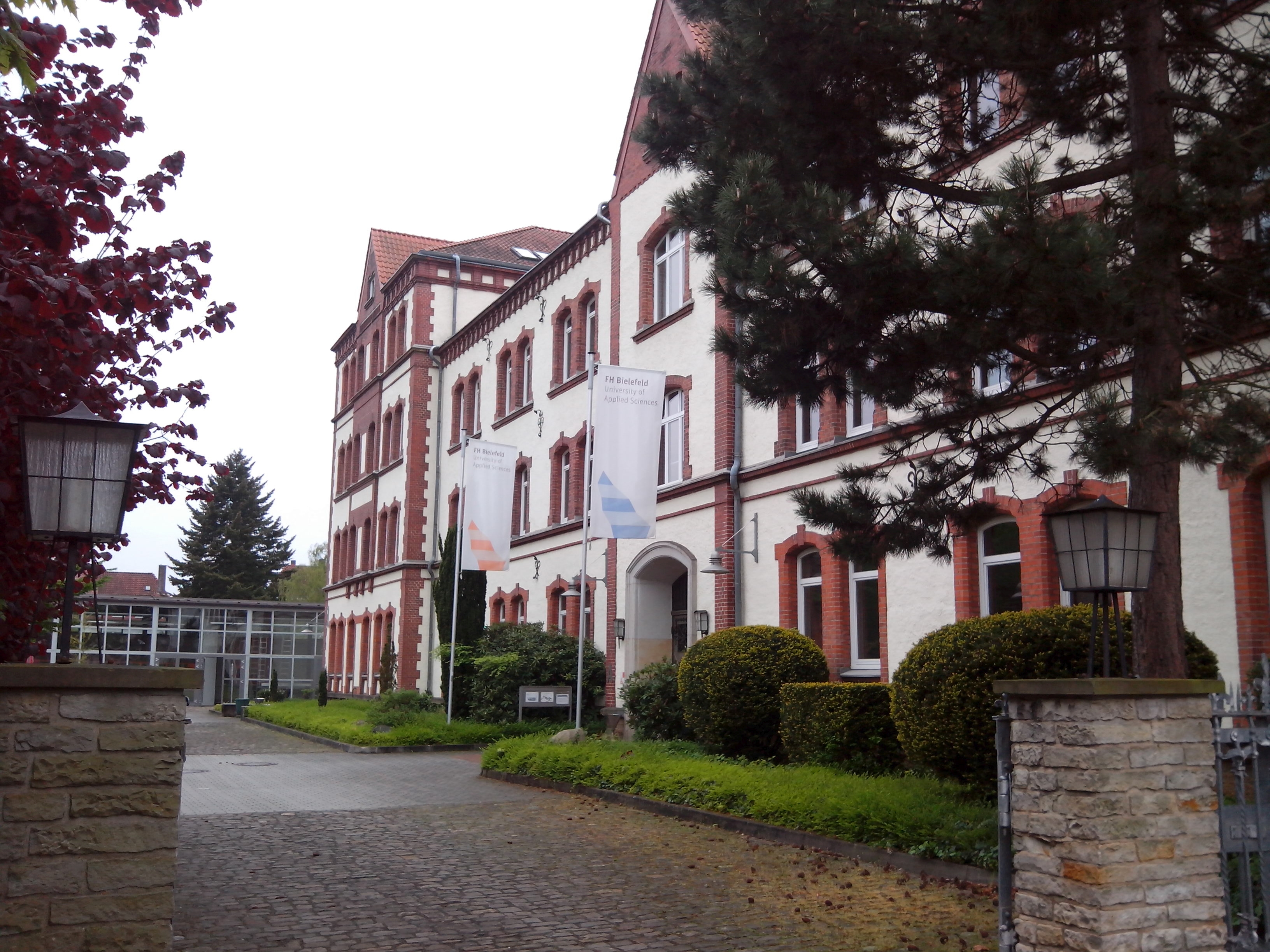 Eingangsberich des Campus Minden